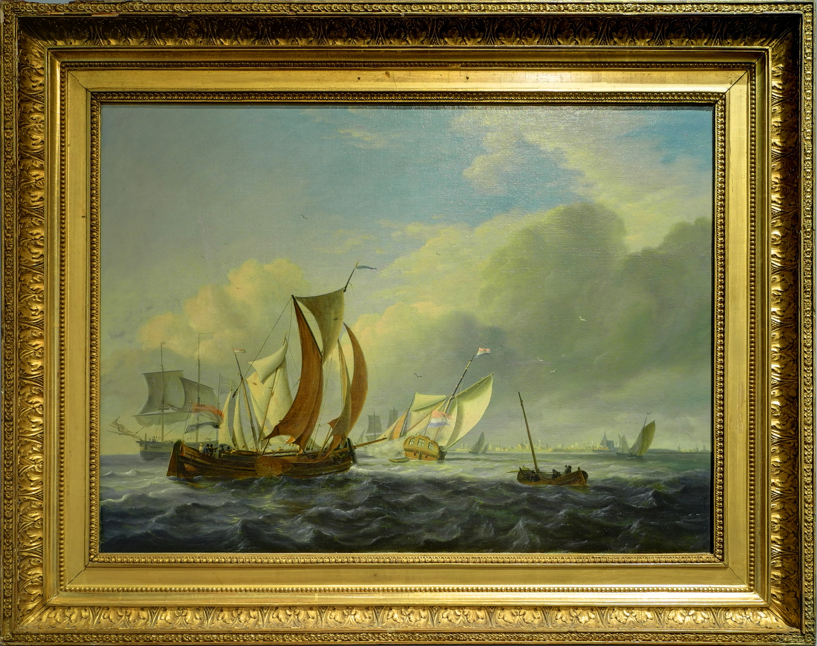 Musée des Beaux-Arts : Mer agitée (HDR). Nicolaus Baur (Harlingen 1767 - Harlingen 1820). 1796, huile sur toile Don Bersier, 1934